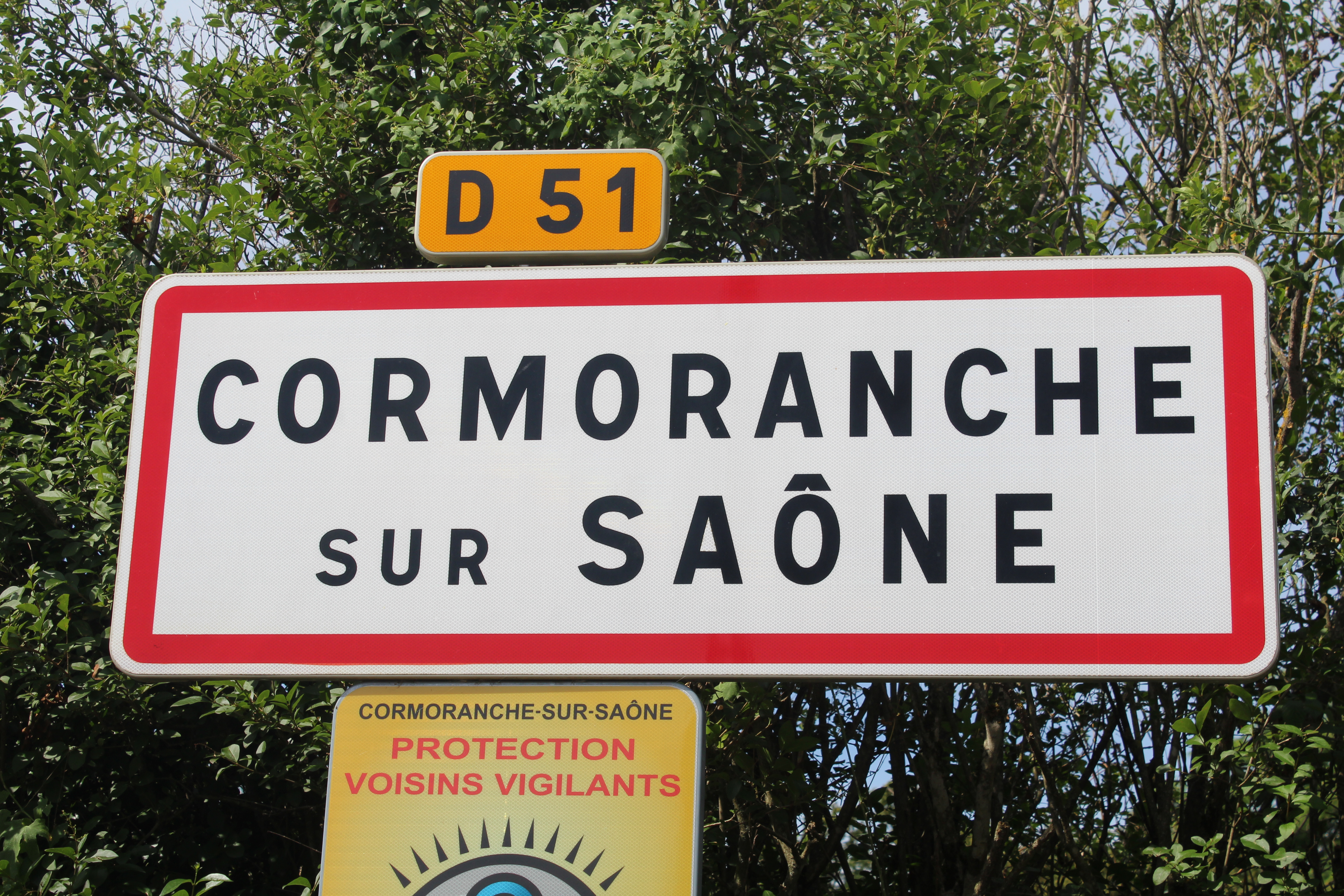 Panneau d'entrée dans Cormoranche-sur-Saône.